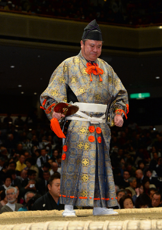 平成２６年１月場所